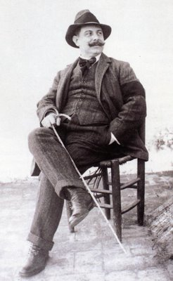 Músic i Compositor